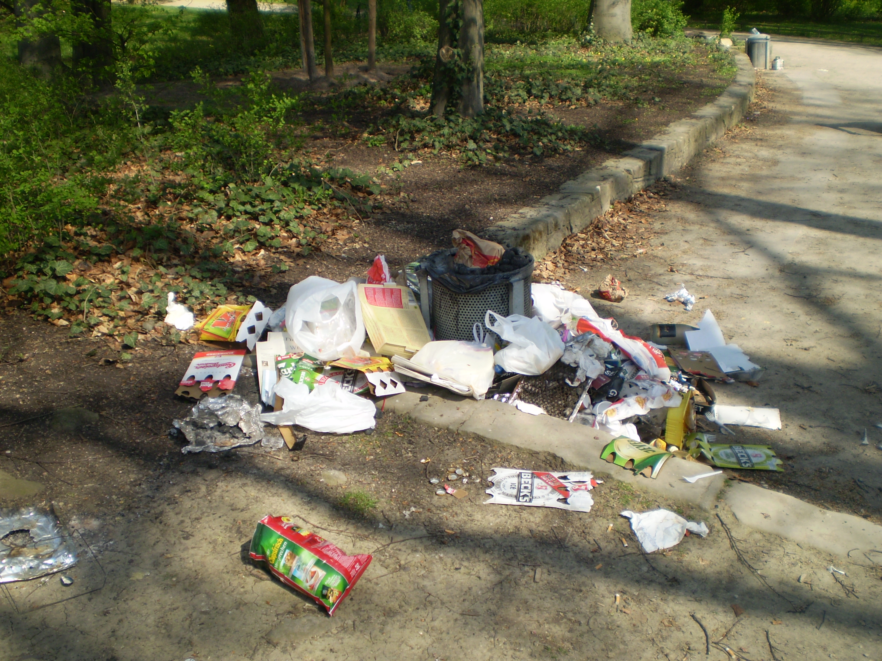 Gut Überfüllter Mülleimer in Hannover